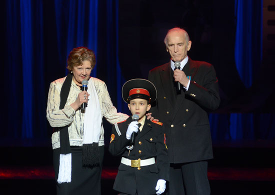 Народный артист СССР Василий Лановой и народная артистка РСФСР Алина Покровская на торжественном вечере, посвящённом 40-летию выхода на экраны фильма «Офицеры»